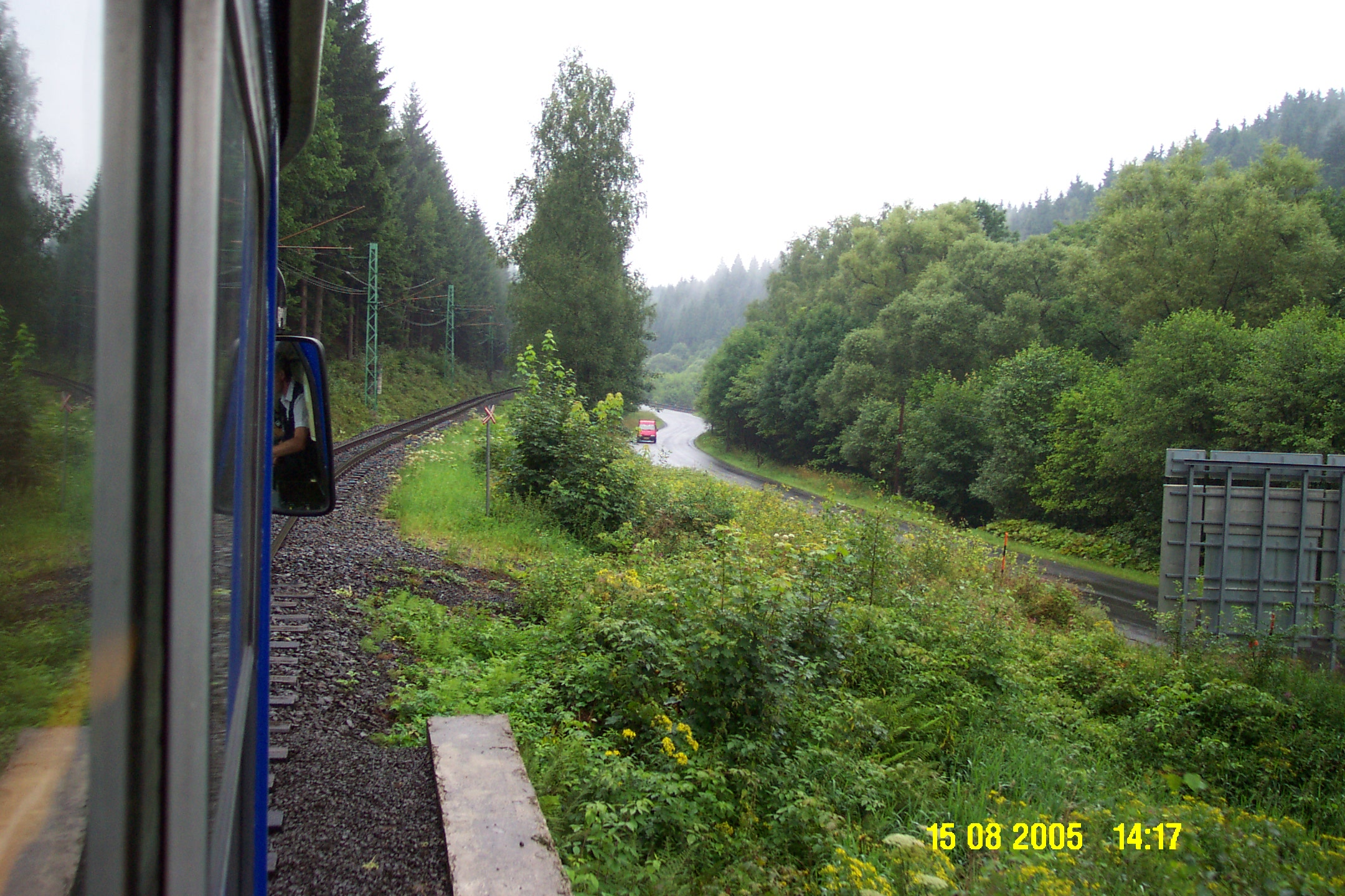 Tramvajová trať Liberec - Jablonec, cca mezi zastávkami Zelené údolí a Nový svět